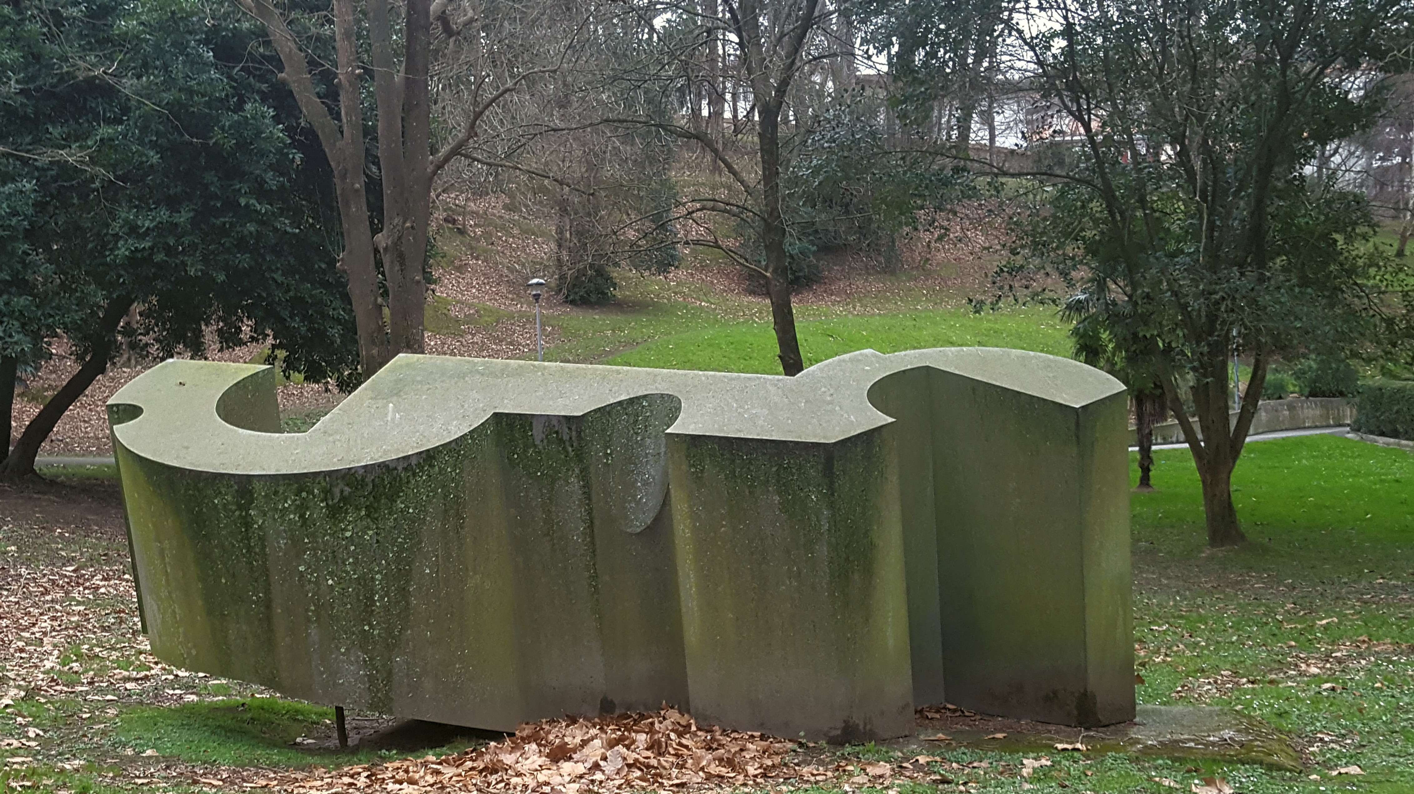 Barojaren Oroimenez eskultura, Donostian, Antigua auzoan